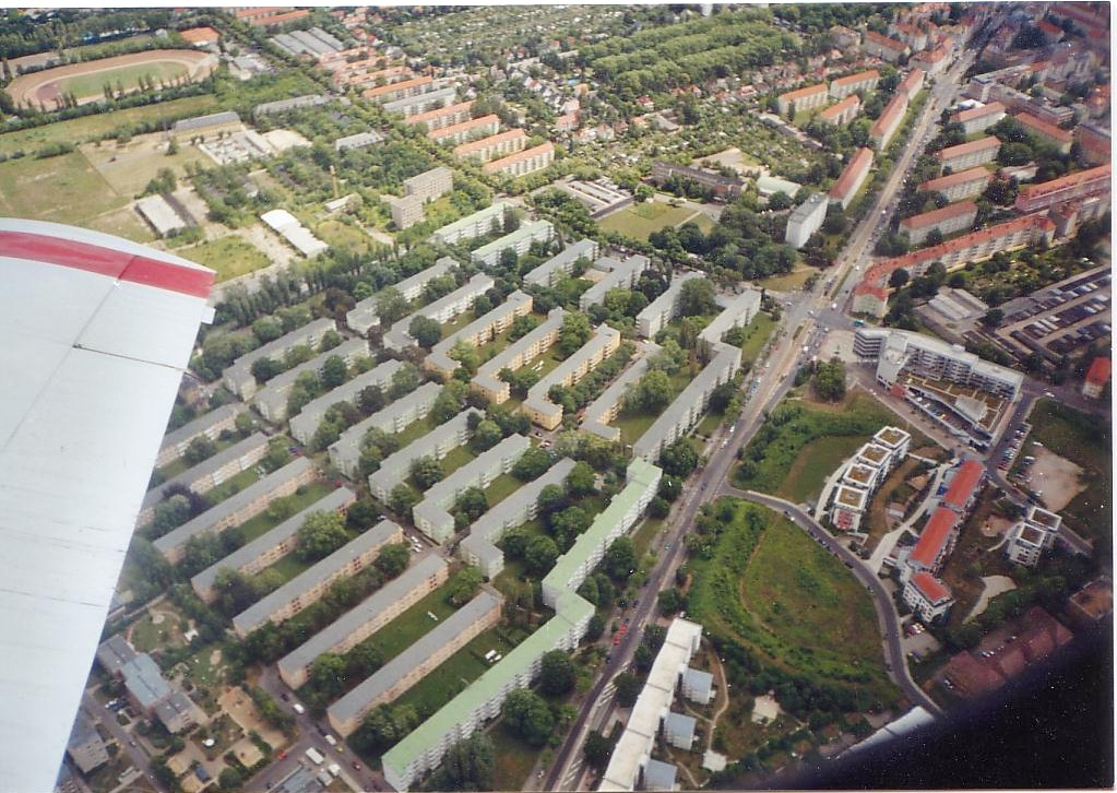 Luftbild Krochsiedlung von Hans-Jürgen Keßler.